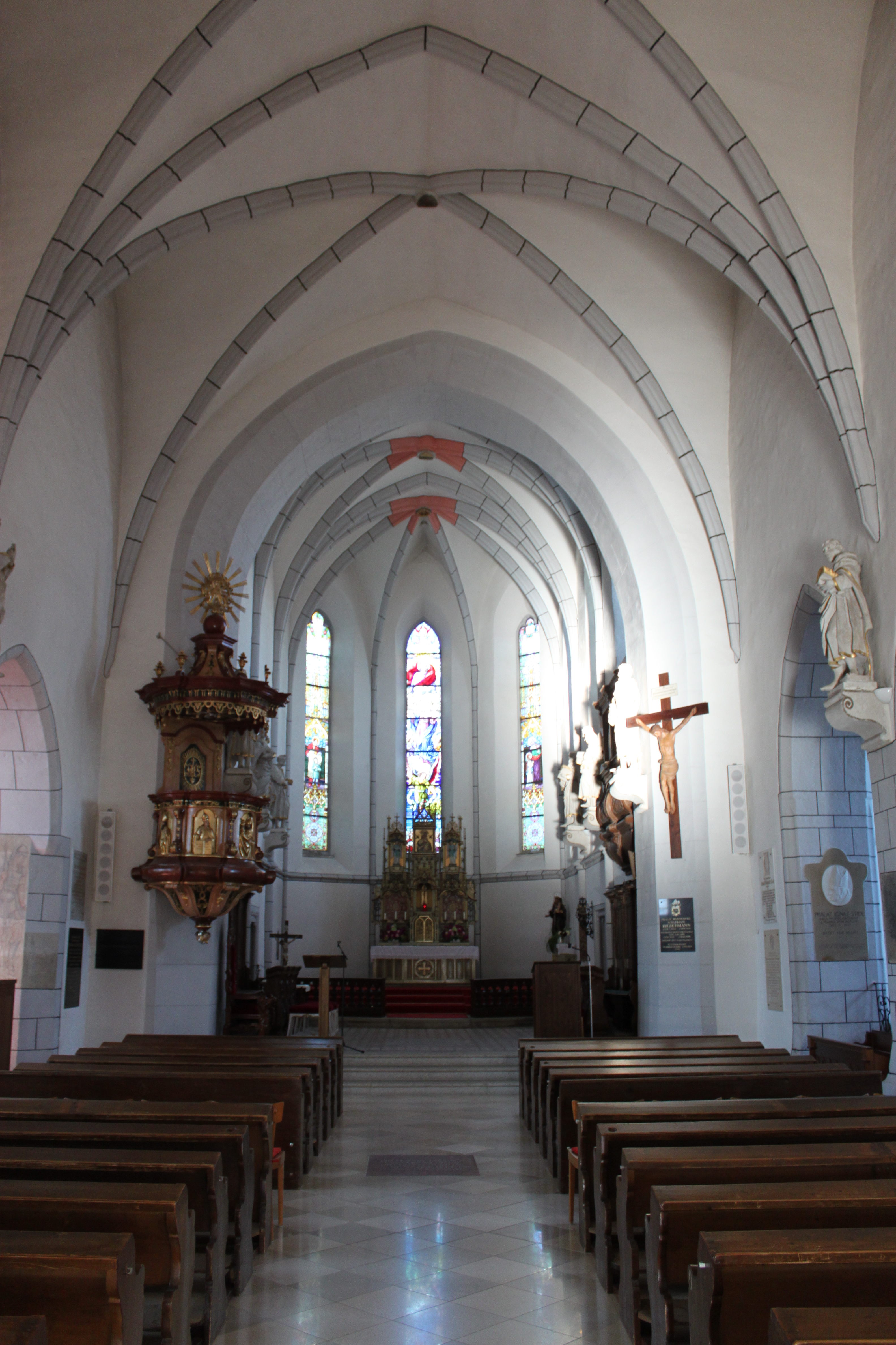 Innenraum der Stiftskirche Eisgarn, Niederösterreich